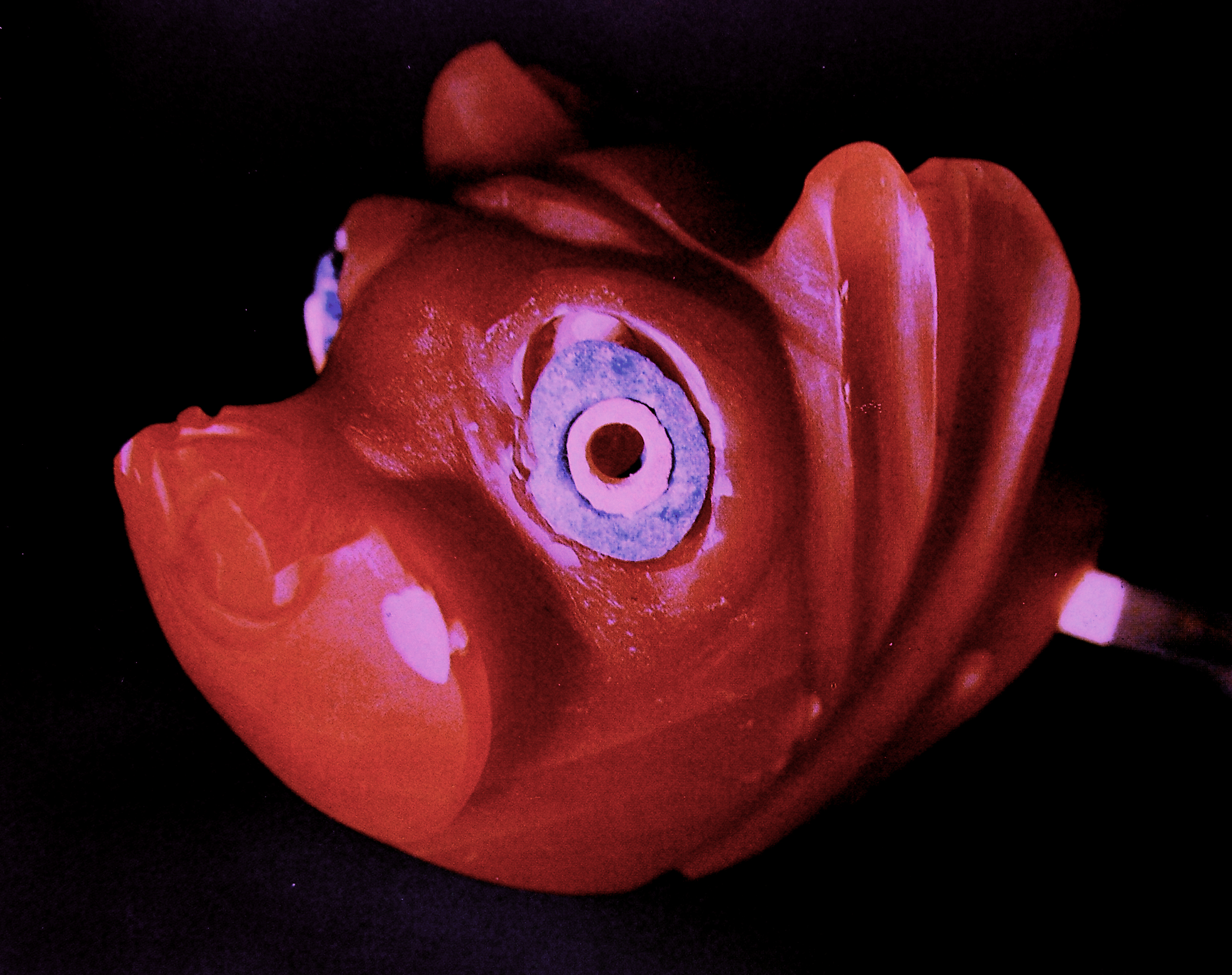 Achát kisplasztika Kültepéből (Anatóliai Civilizációk Múzeuma, Ankara) - 4.1 cm, 18th century BC.